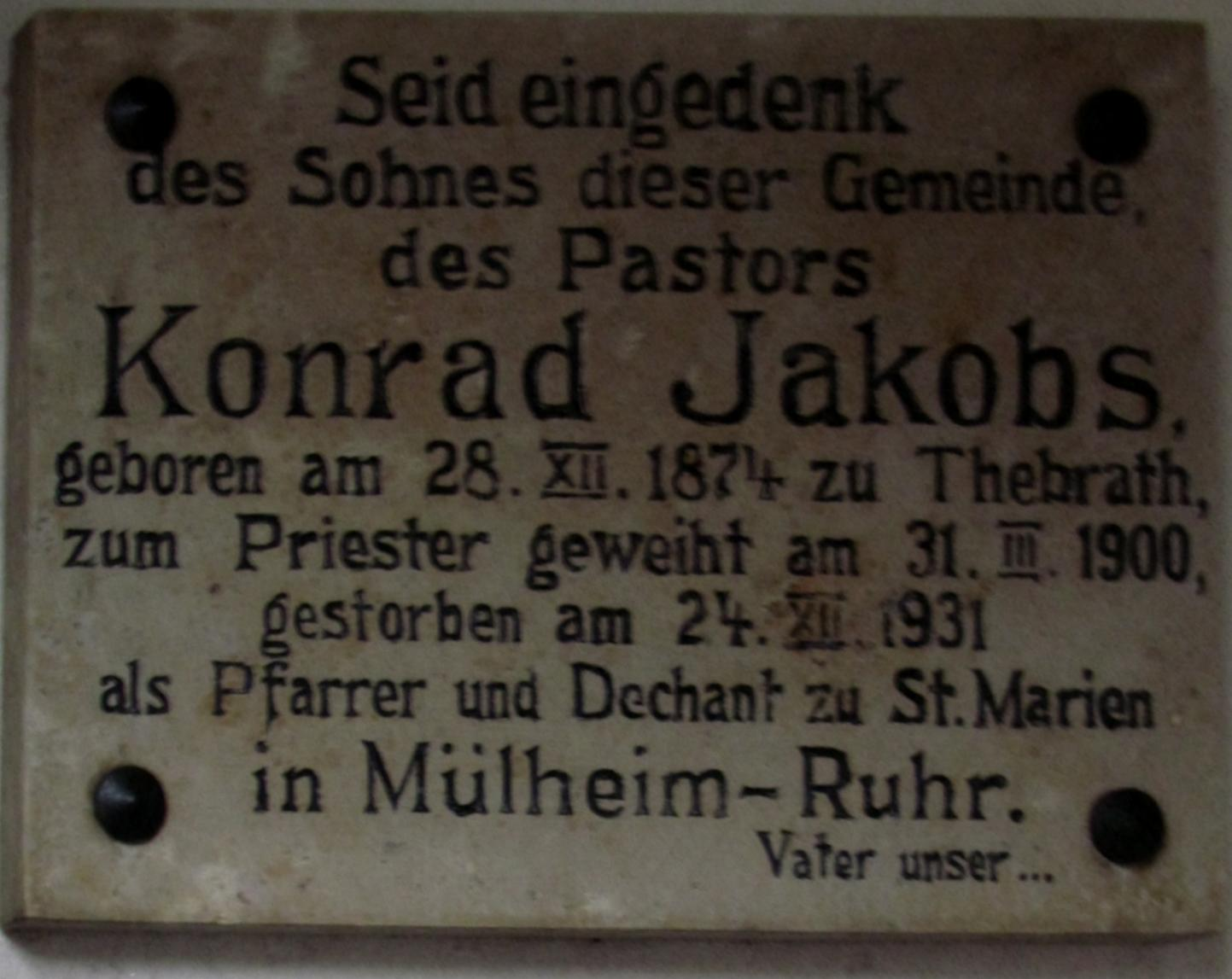 Kirchen, Kapellen in Heinsberg